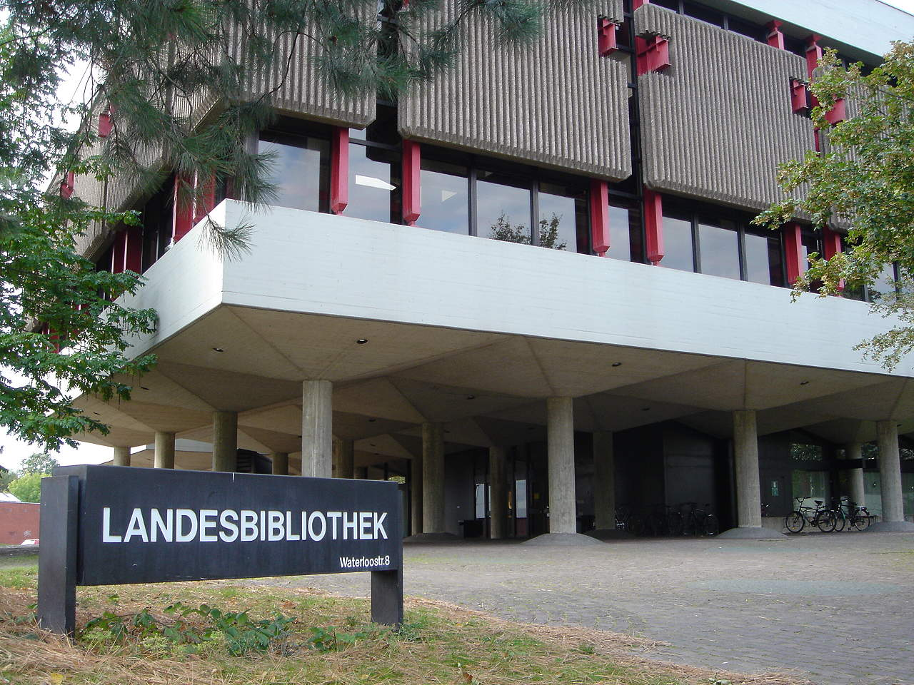 Die Niedersächsische Landesbibliothek in Hannover